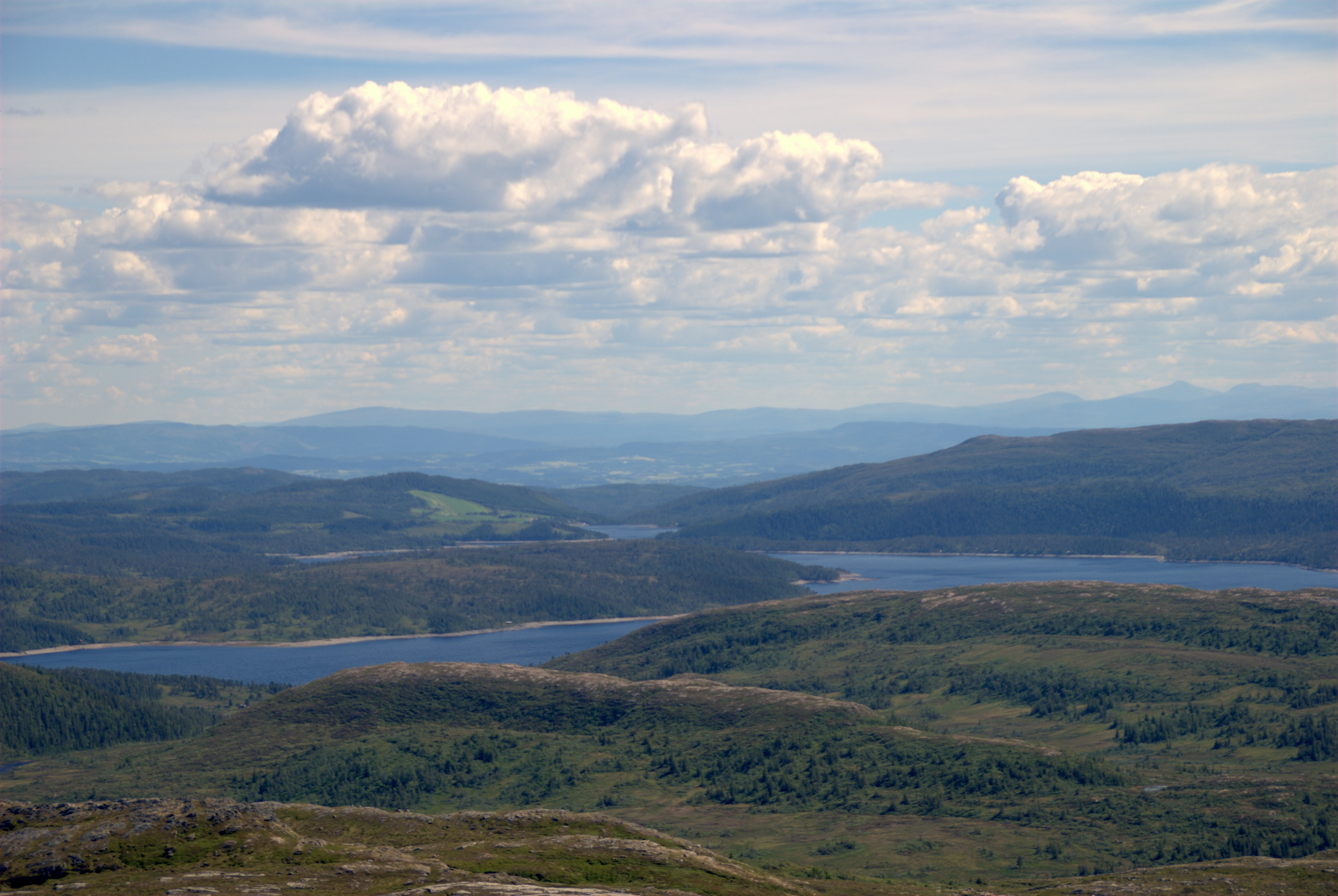 Holden i Verran kommune i Nord-Trøndelag sett fra Finnvollheia (675 moh).